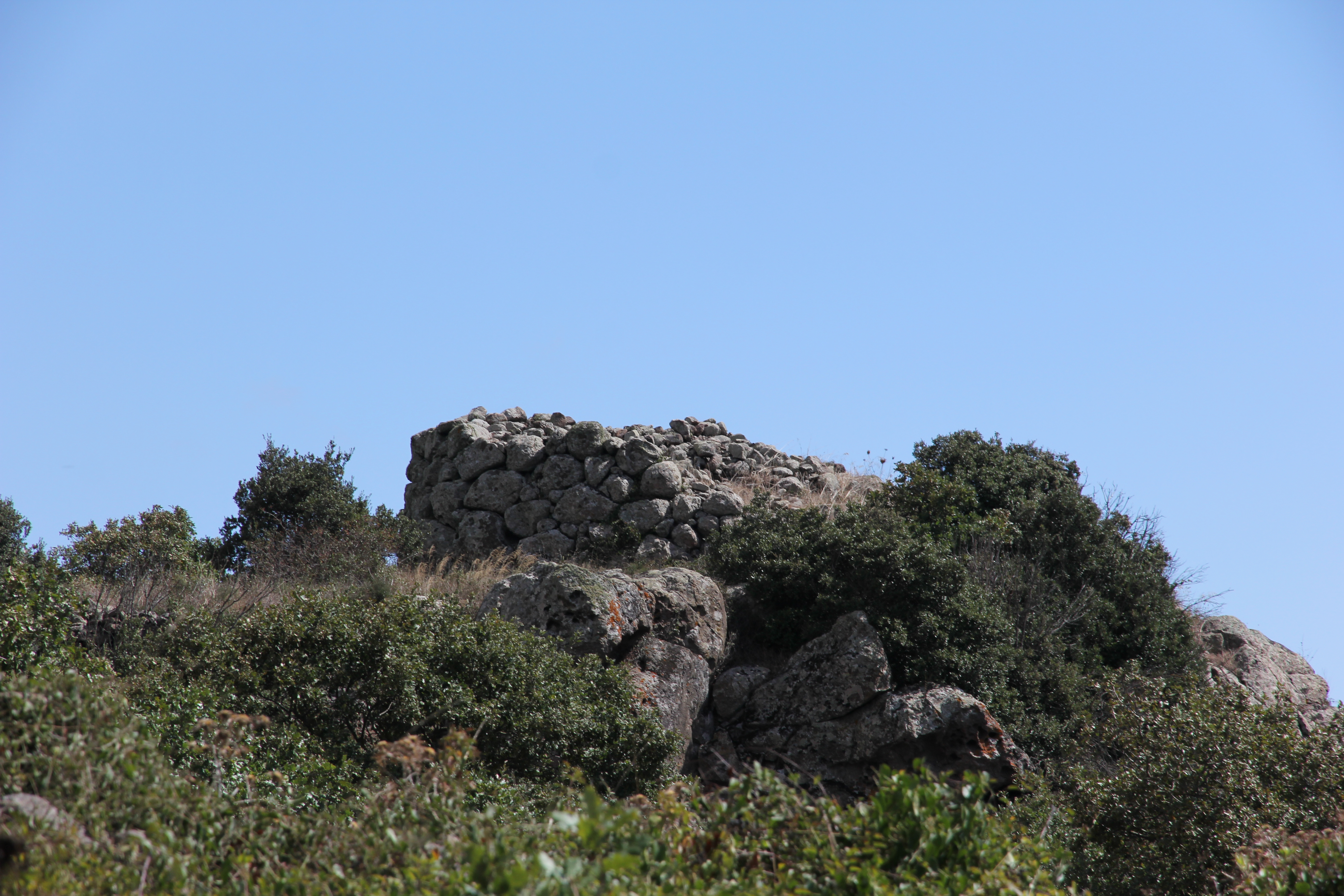 Nuraghe Pranu 'e Ruos